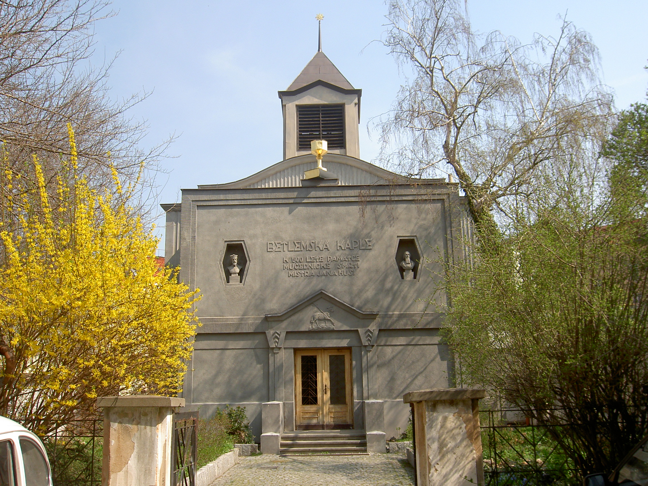 Betlémská kaple na Žižkově